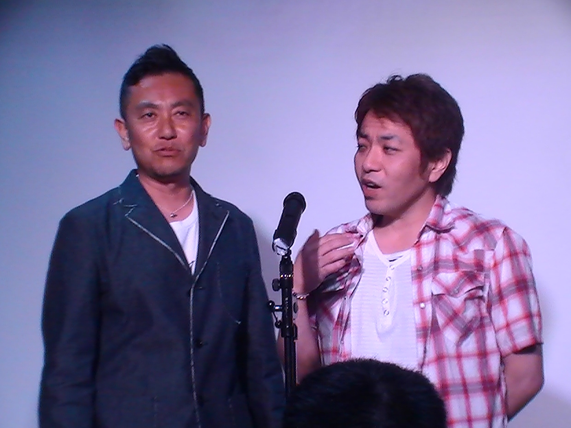 ガンリキ（2017年5月12日-2）